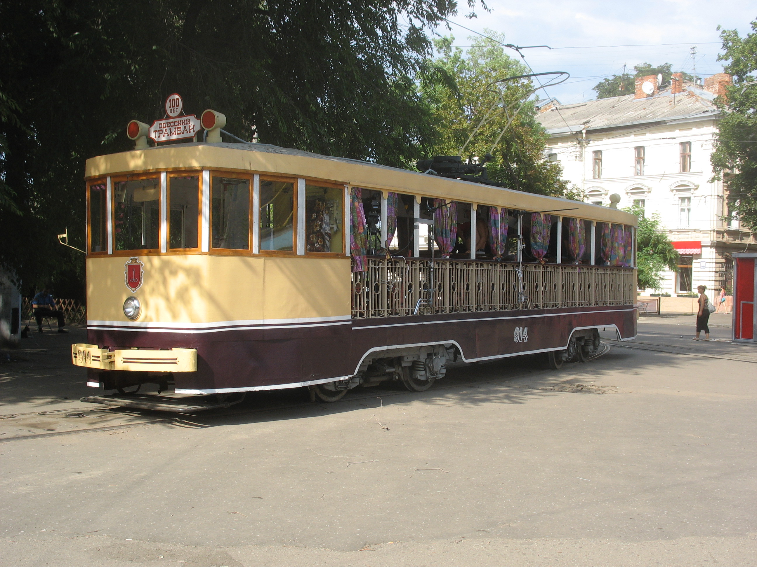 Модернизированный экскурсионно-прогулочный трамвай МТВ-82 №914 в Одессе